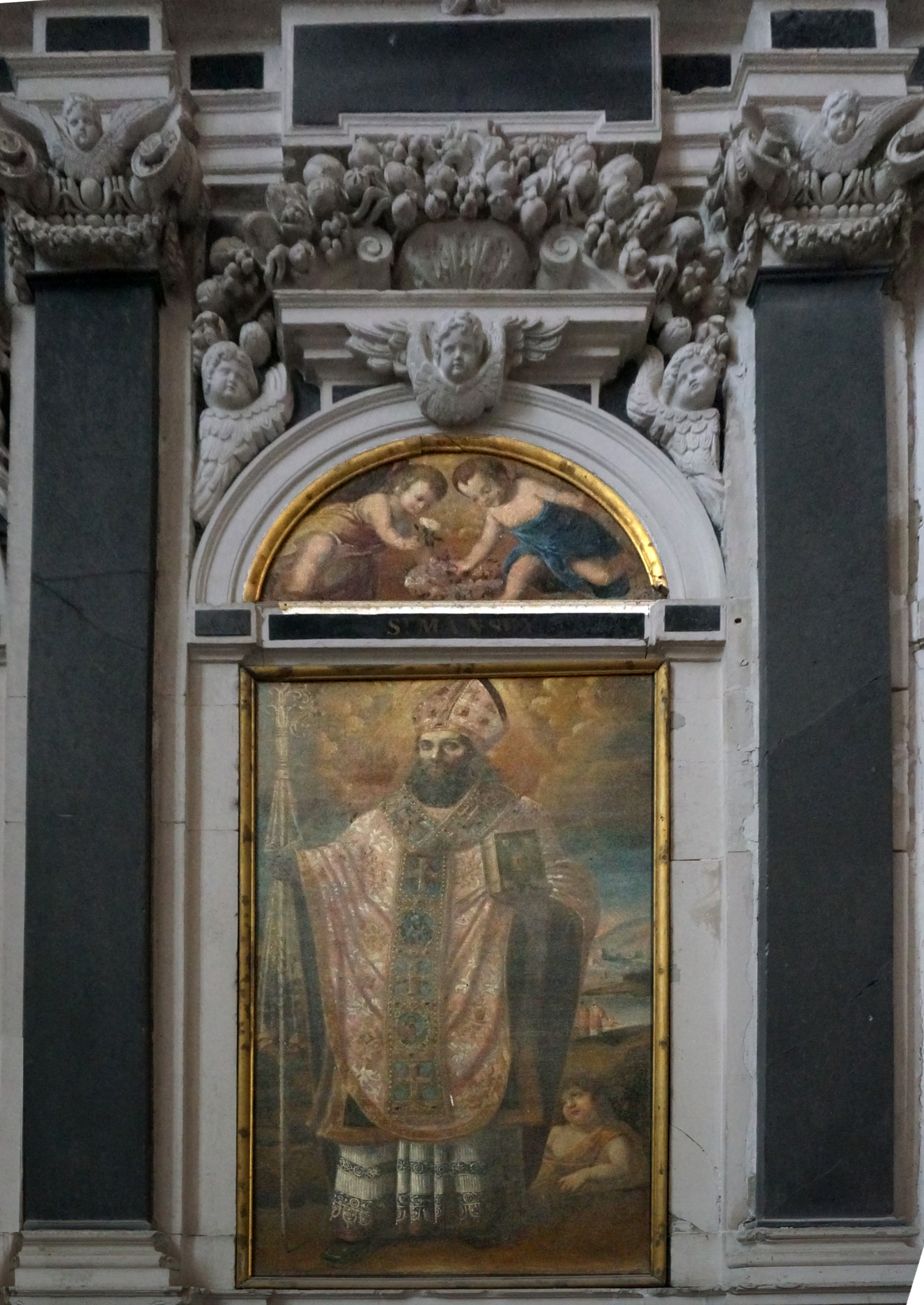 Toul (Meurthe-et-Moselle, France), cathédrale St Étienne, Saint Mansuy, premier évêque de Toul, anonyme.